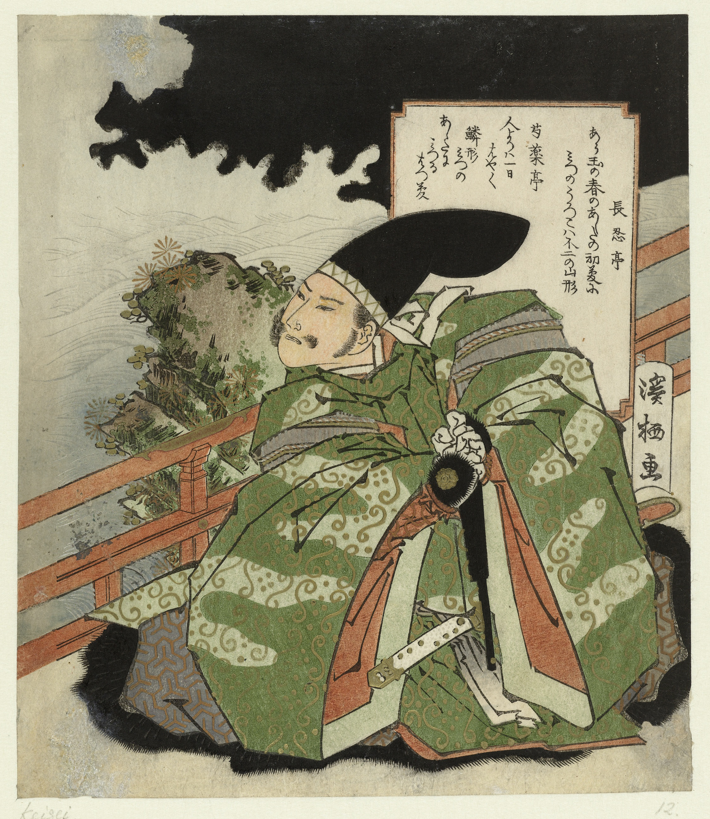 Edelman Hôjô no Tokimasa (1135-1215) op een terras aan de zee, biddend met gevouwen handen. Hij draagt een groene kimono en een zwarte hoge hofmuts (eboshi). Met twee gedichten. Label Line: mentioned on object Aoigaoka Keisei, 1832, kleurenhoutsnede; blinddruk; lijnblok in zwart met kleurblokken; metaalpigmenten Collection: prenten; Japan (collectie)